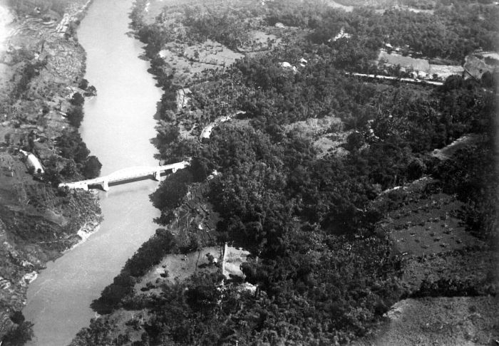 Repronegatief. Luchtfoto van de brug over de rivier Tjitaroem bij Batoedjadjar, Tjimahi, Preanger, West-Java